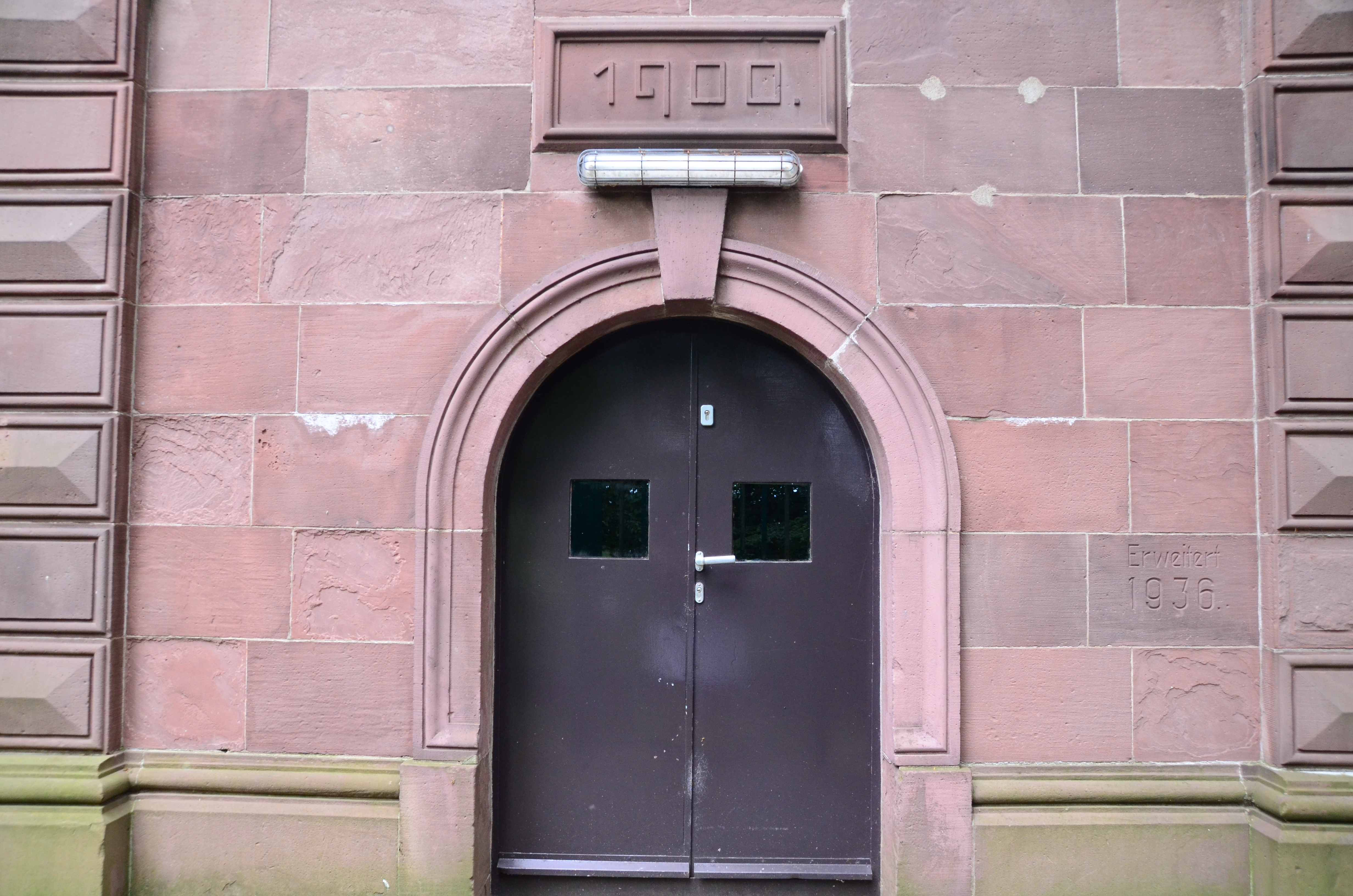 Der Hochbehälter am Kapellenberg in Menden wurde seinerzeit durch das Wasserwerk in der Mendener Horlecke versorgt und belieferte die Mendener Haushalte fortan mit Wasser.